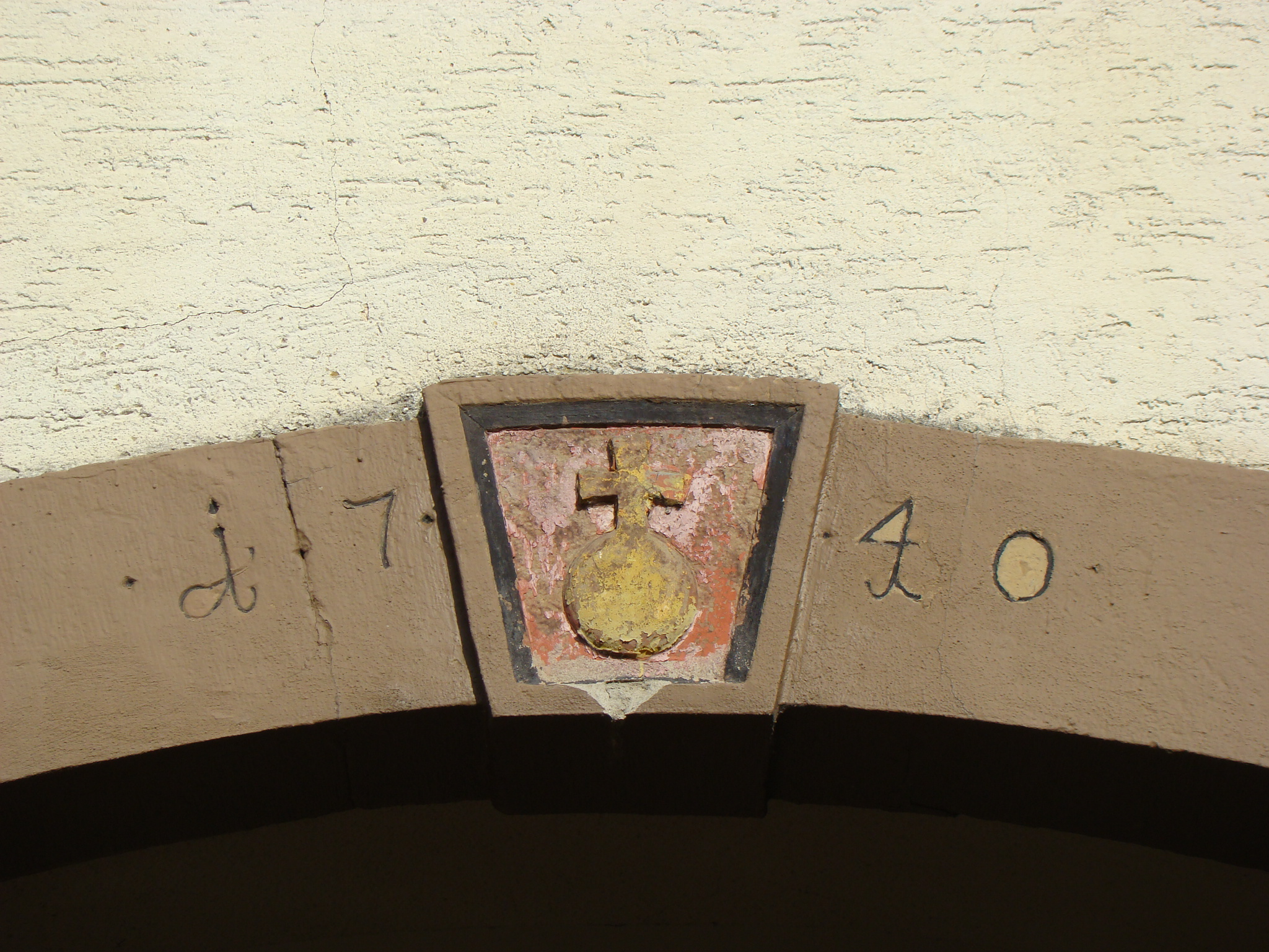 Altes Rathaus in Untergruppenbach, Wappenschlussstein und Datum 1740